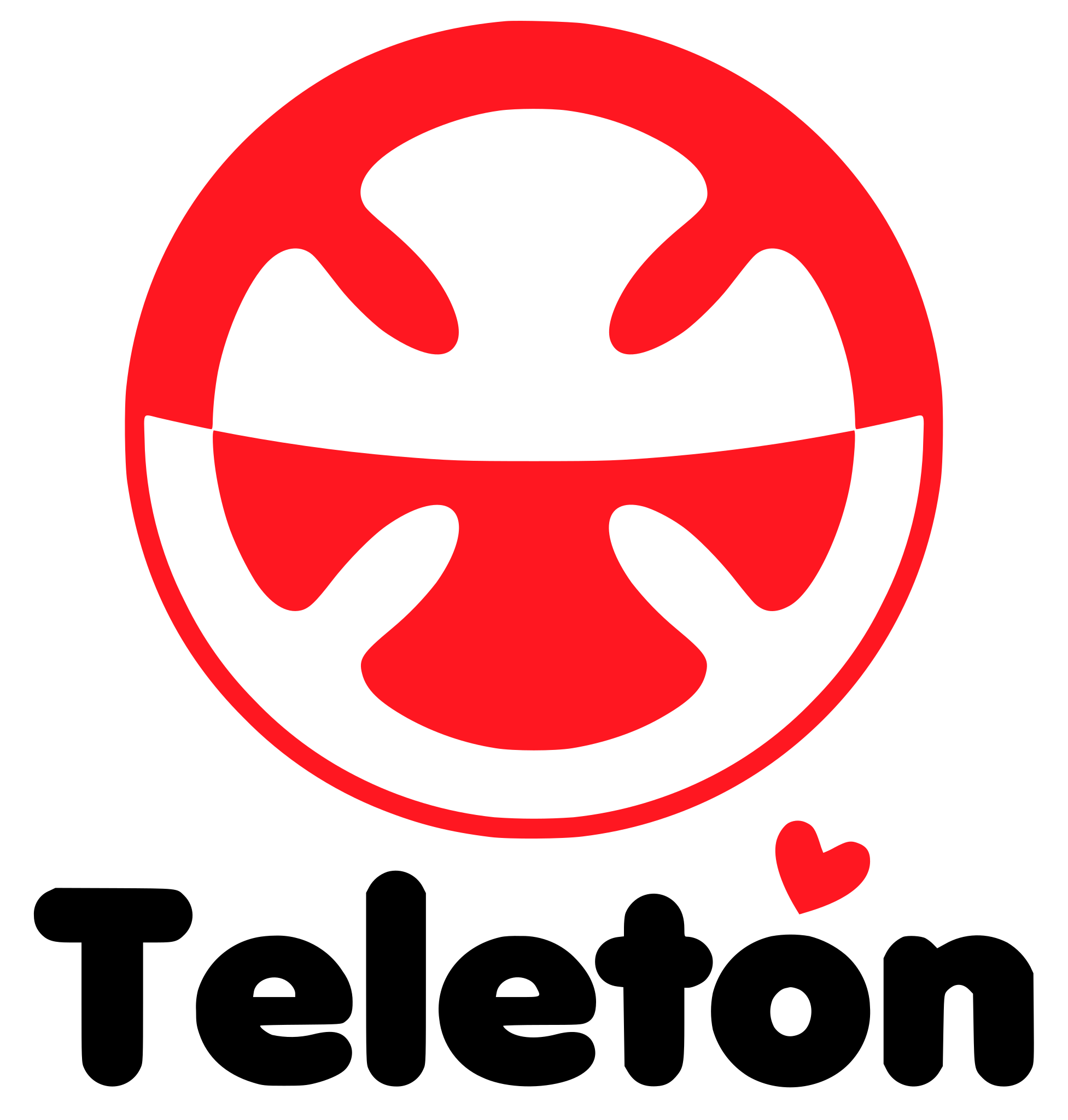 Logo oficial Teletón Perú.